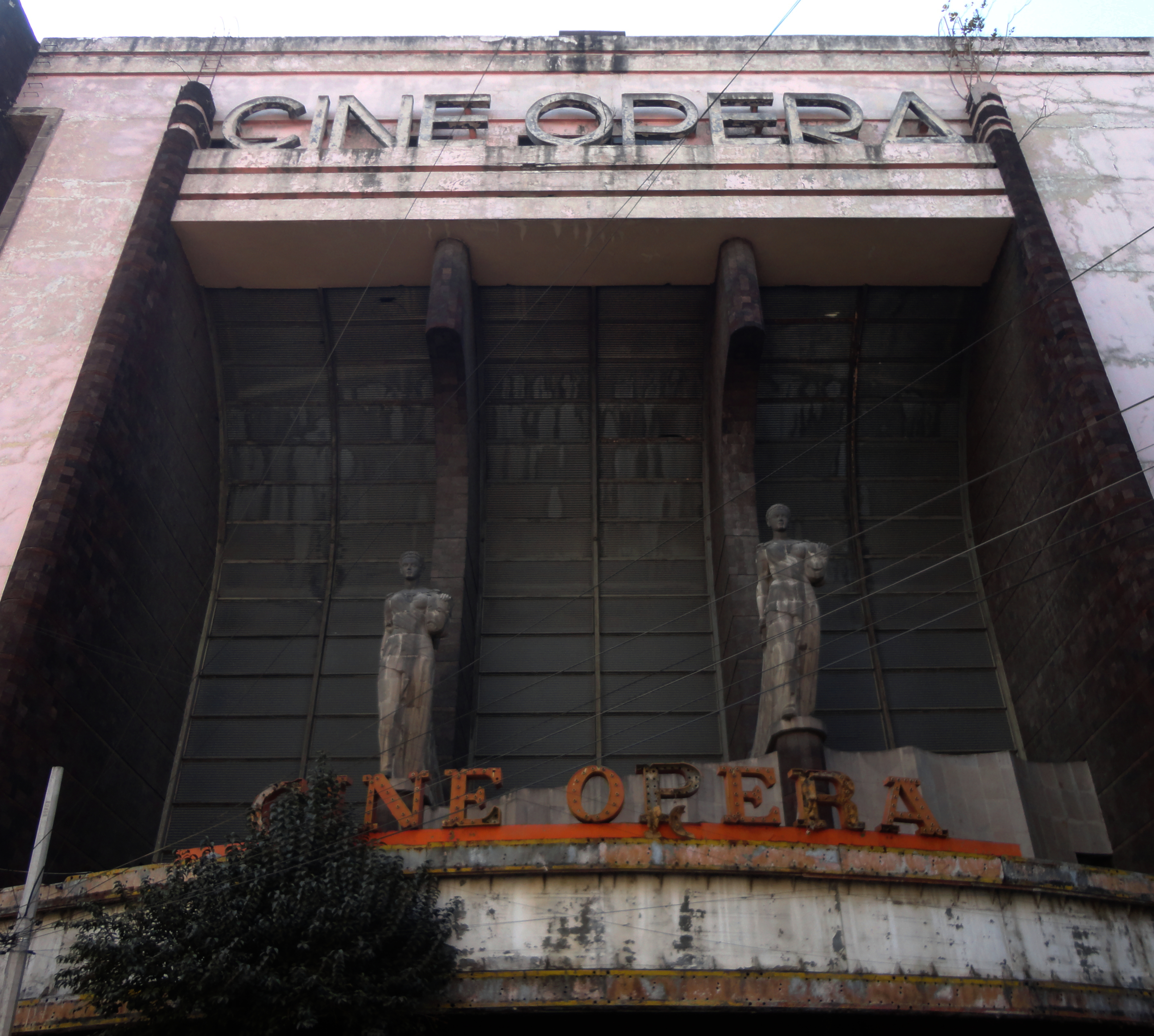 Cine Ópera - Colonia San Rafael, Ciudad de México, México.